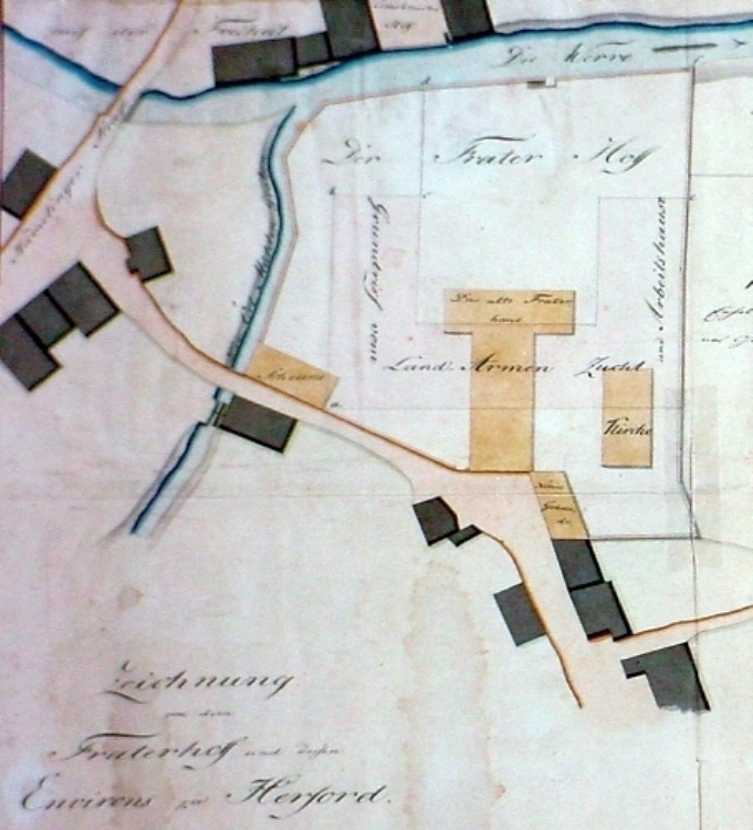 Skizze (gewestet, Norden ist rechts) des Fraterhofs in Herford; links oben die Hämelinger Straße, oben der alte Verlauf der Werre ("Bowerre")